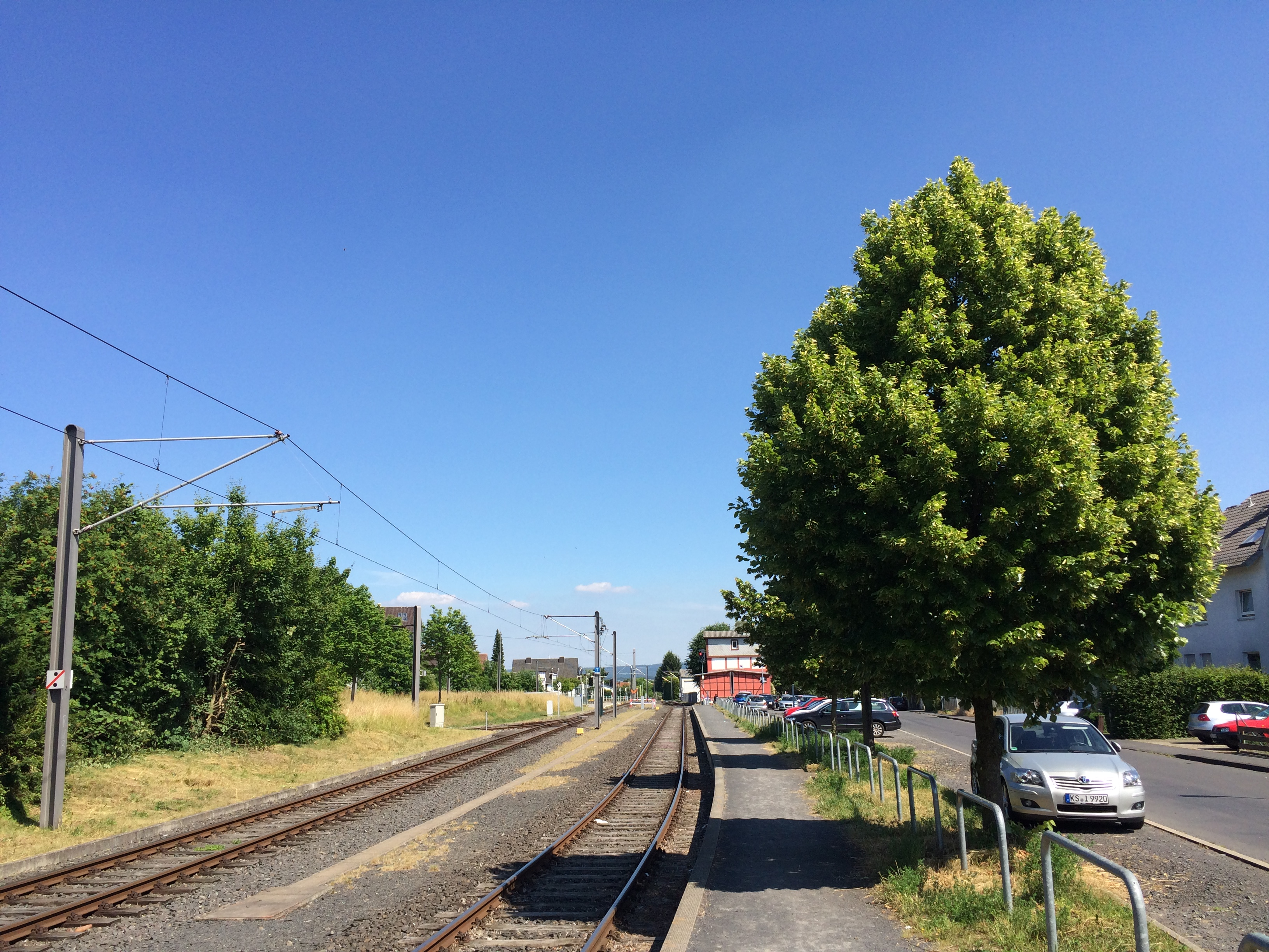 Bahnsteig des Bahnhofes Baunatal-Großenritte, an dessen Ende das Bahnhofsgebäude, Eco Pfad Kulturgeschichte Großenritte